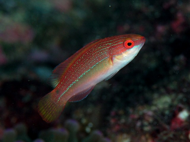 イトヒキベラ Cirrhilabrus temminckii